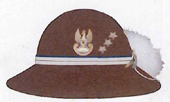 Współczesny kapelusz podhalański WP